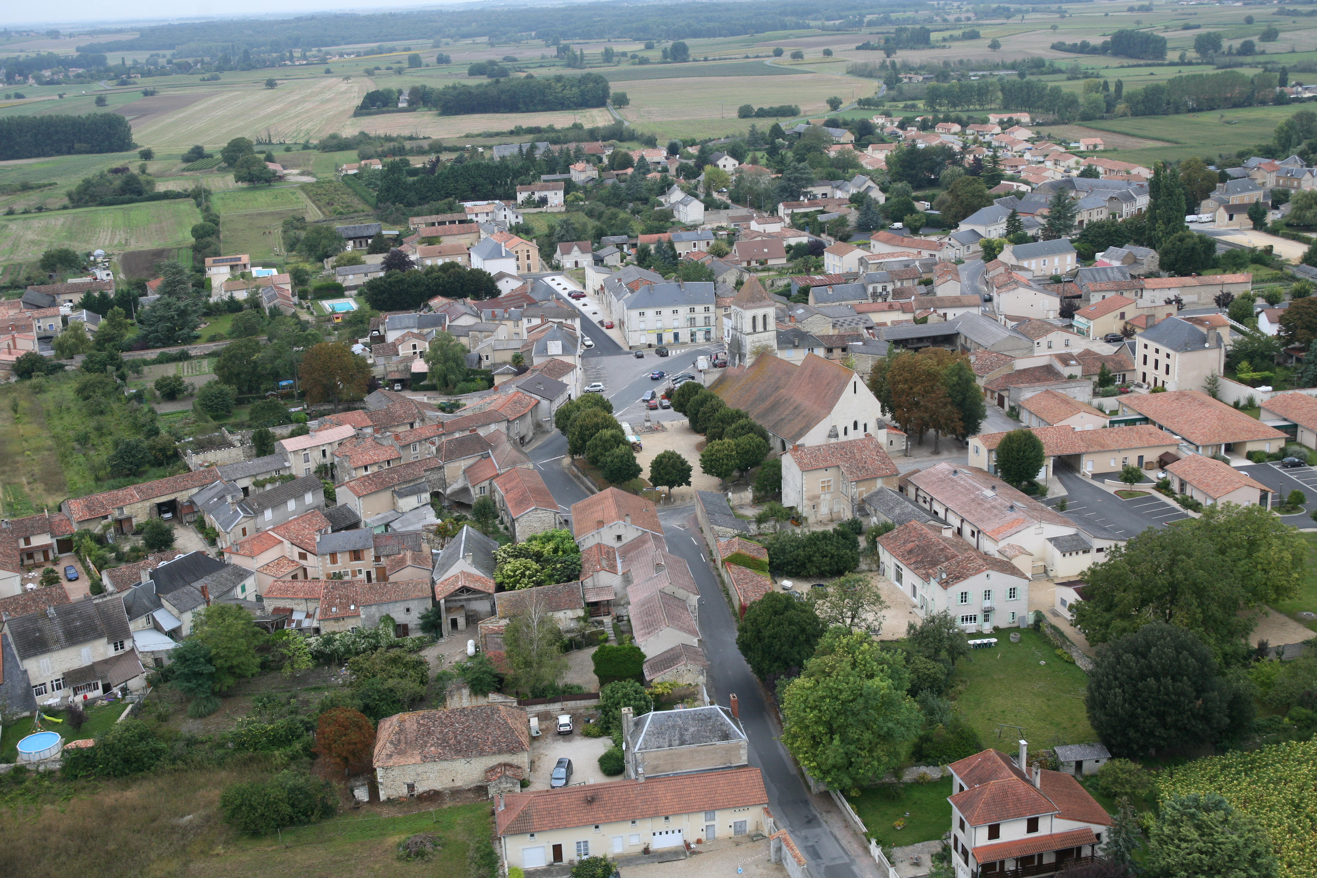 Vendeuvre du Poitou vue du ciel